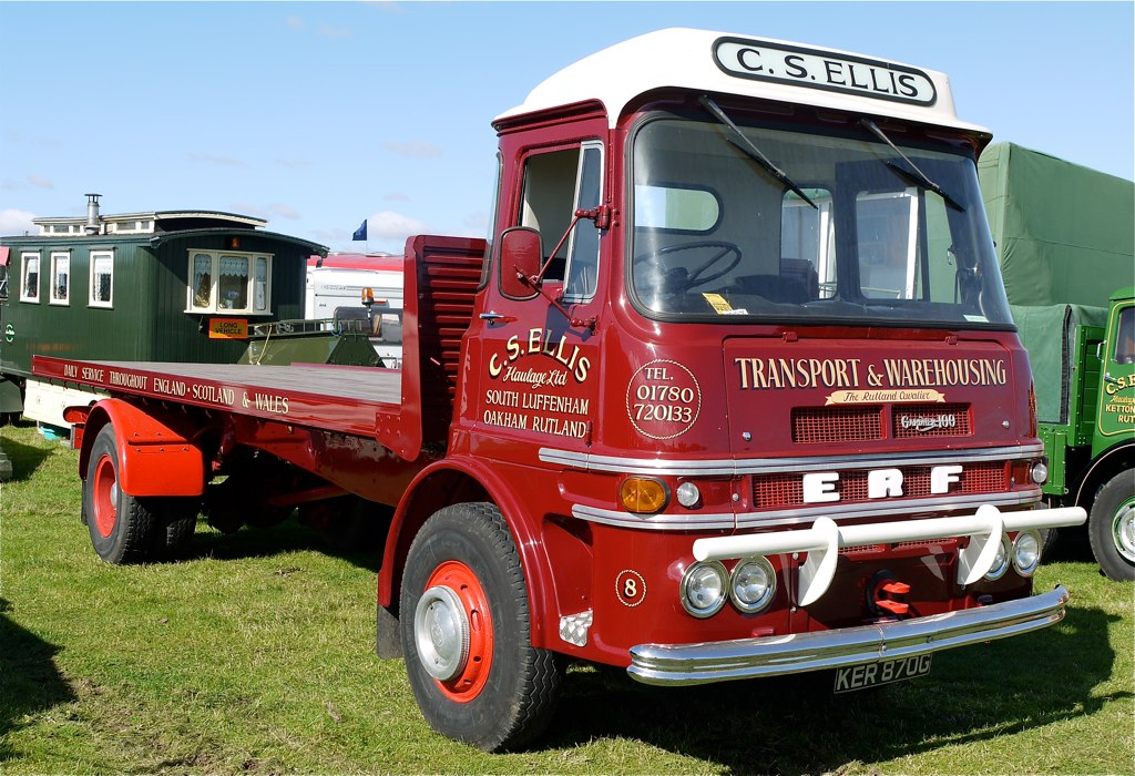 Panasonic G1 14-45 Lens